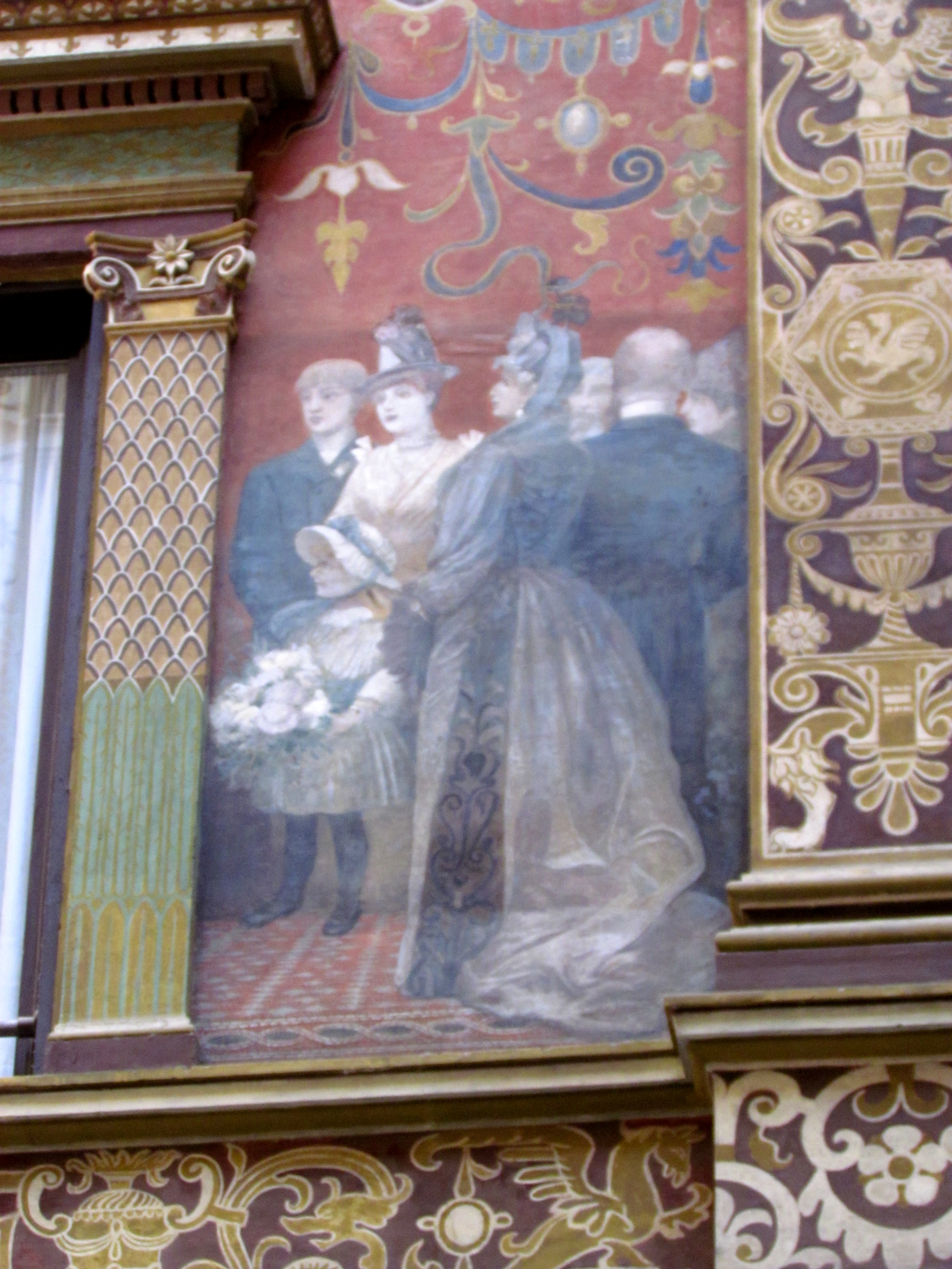 Bildinhalt: Gemälde im 1. Stock des Innenhofs der Galleria Sciarra Aufnahmeort: Rom, Italien